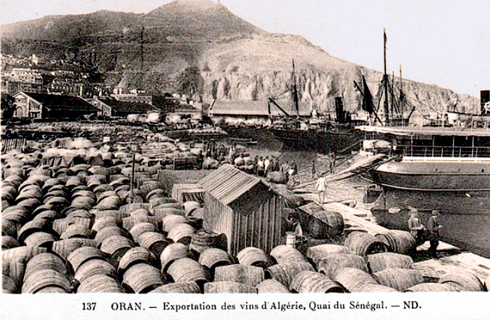 Embarquement des barriques de vin d'Algérie du port d'Oran pour la France